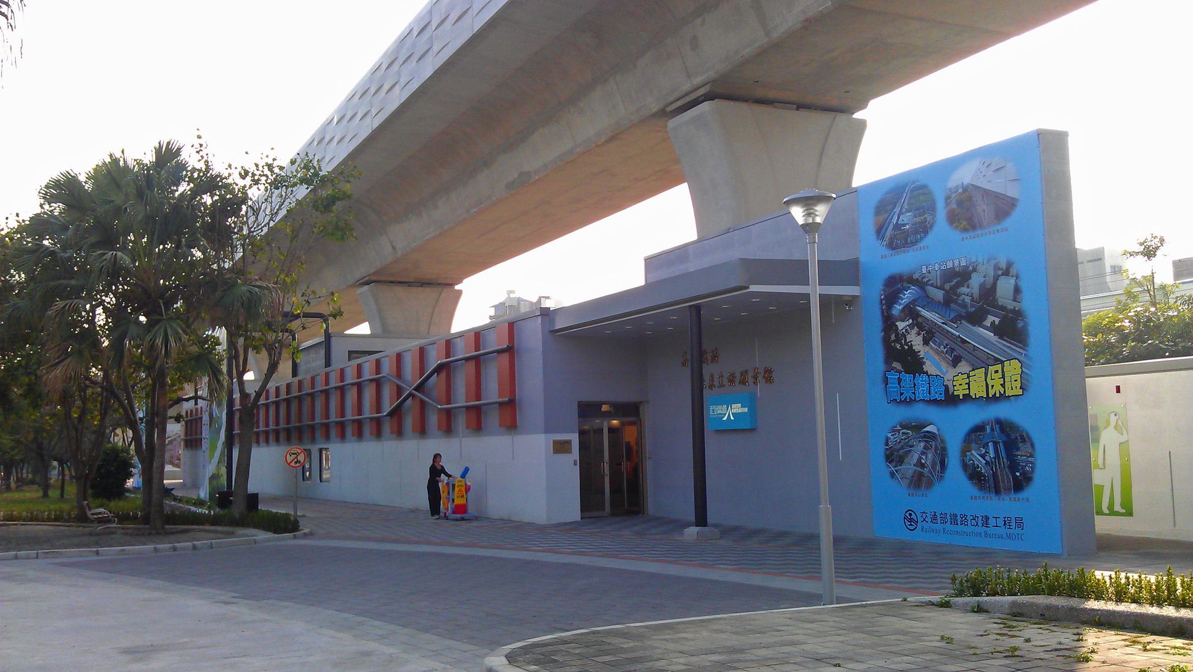 交通部鐵路改建工程局高架鐵路未來生活願景館，位於臺中市東區東光路與東成路口，2012年11月17日揭牌啟用。